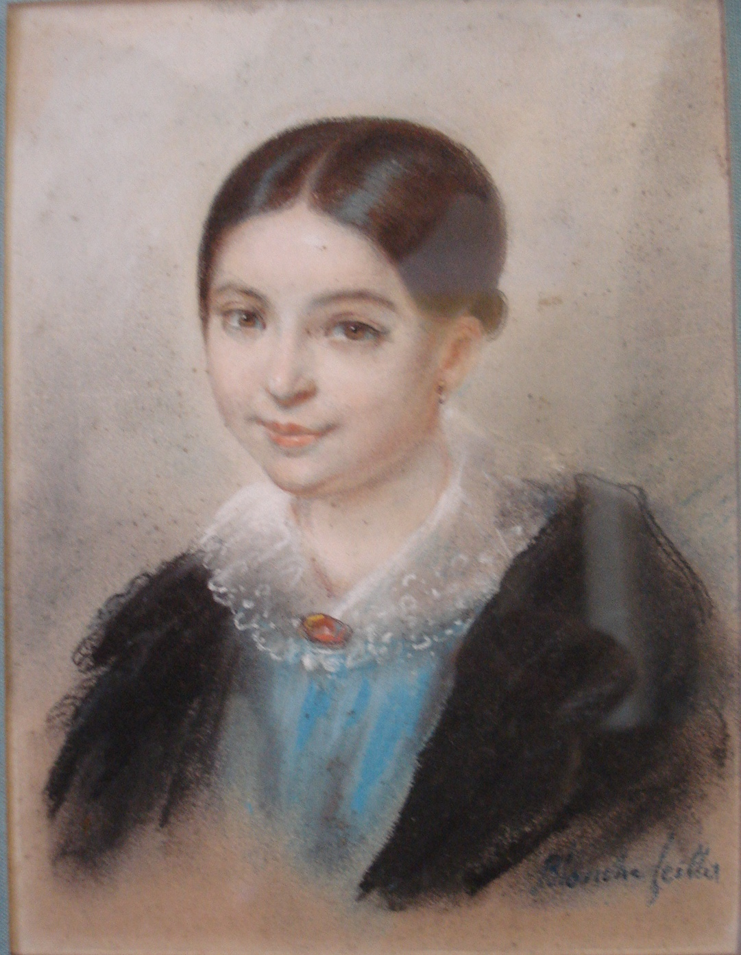 Hélène Feillet, peinte par sa sœur Blanche Feillet